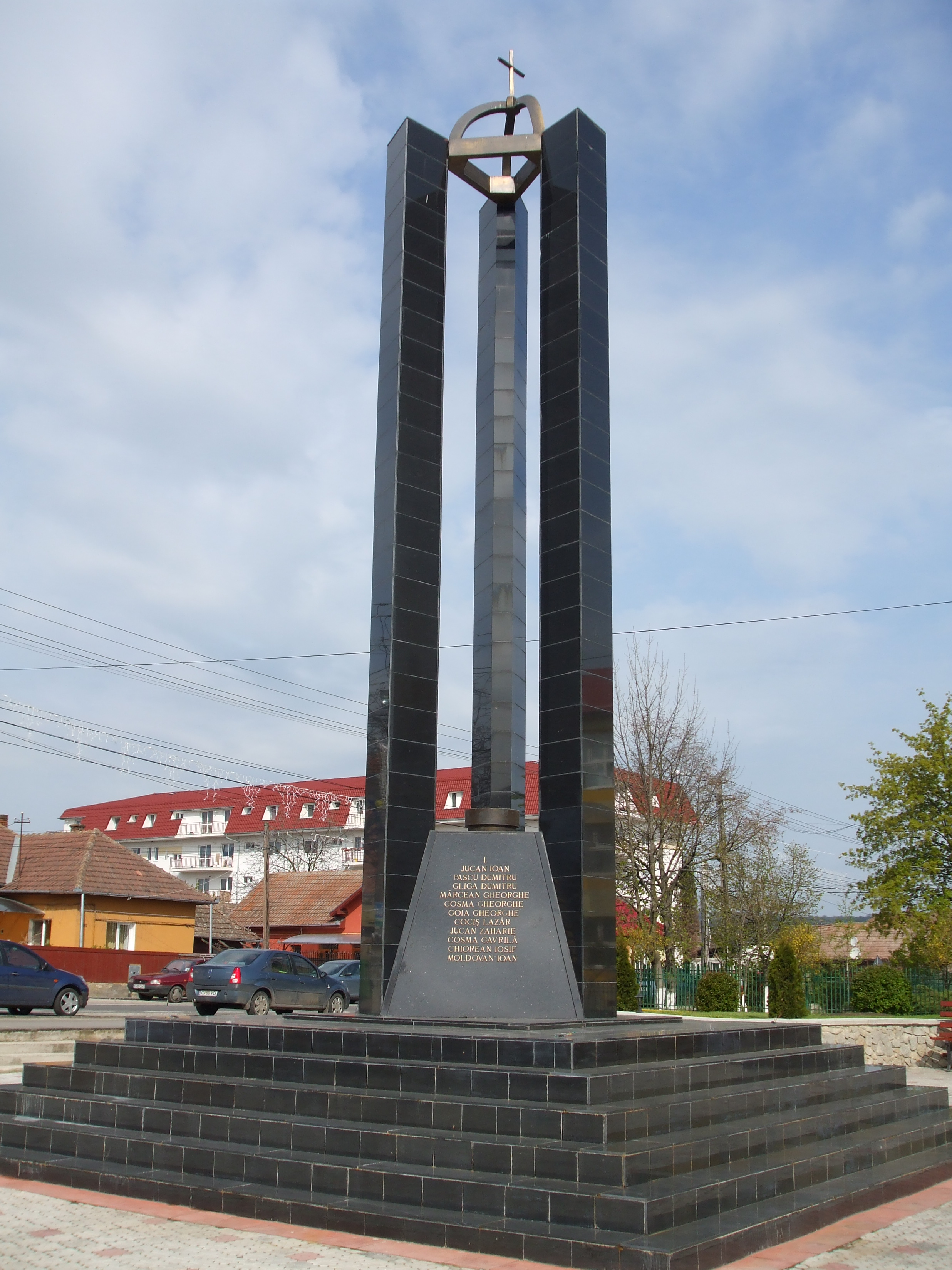 Monumentul Eroilor din Apahida, judetul Cluj